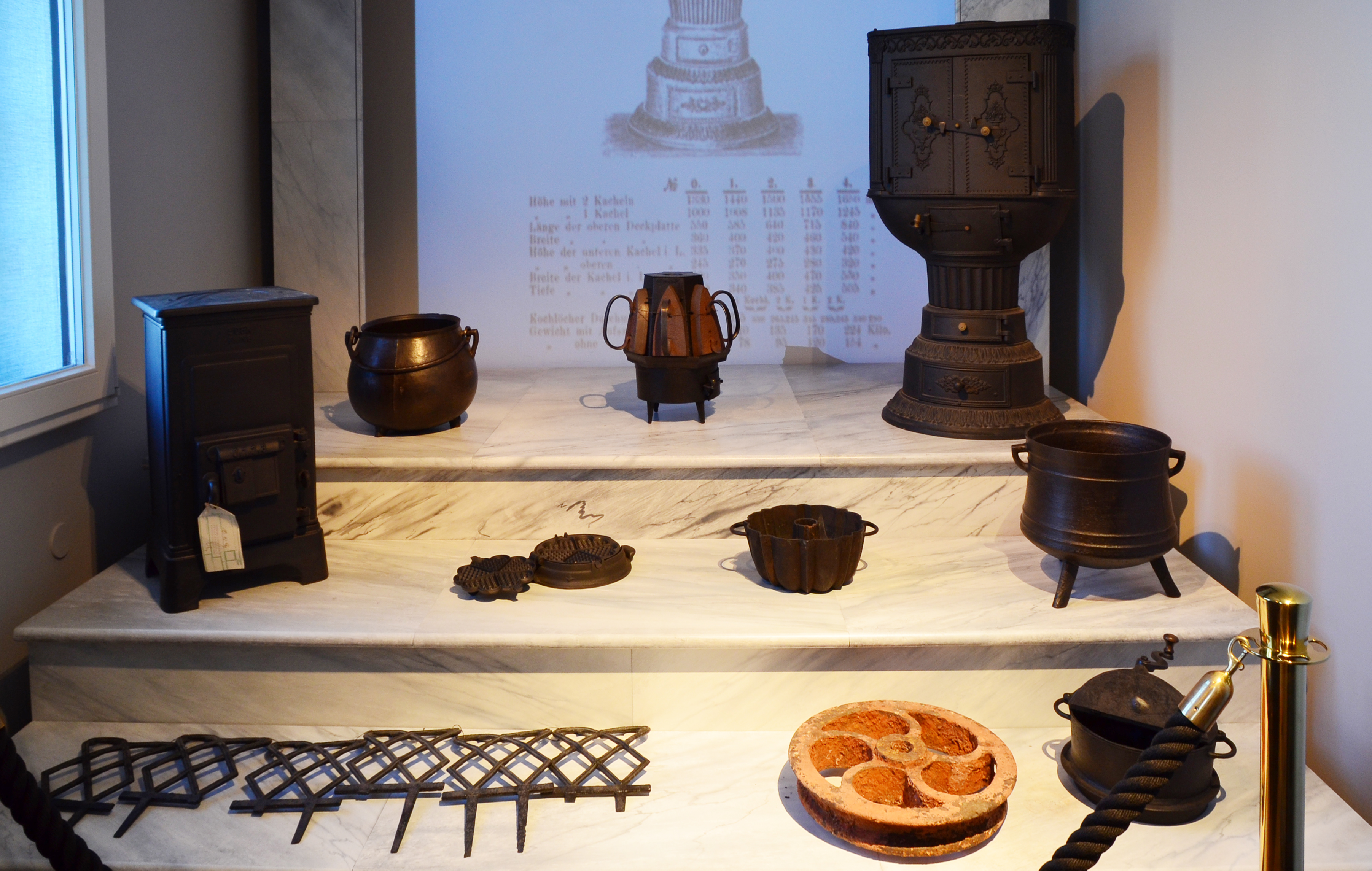 Museum Haus Hövener, Schauraum der Briloner Gusskunst